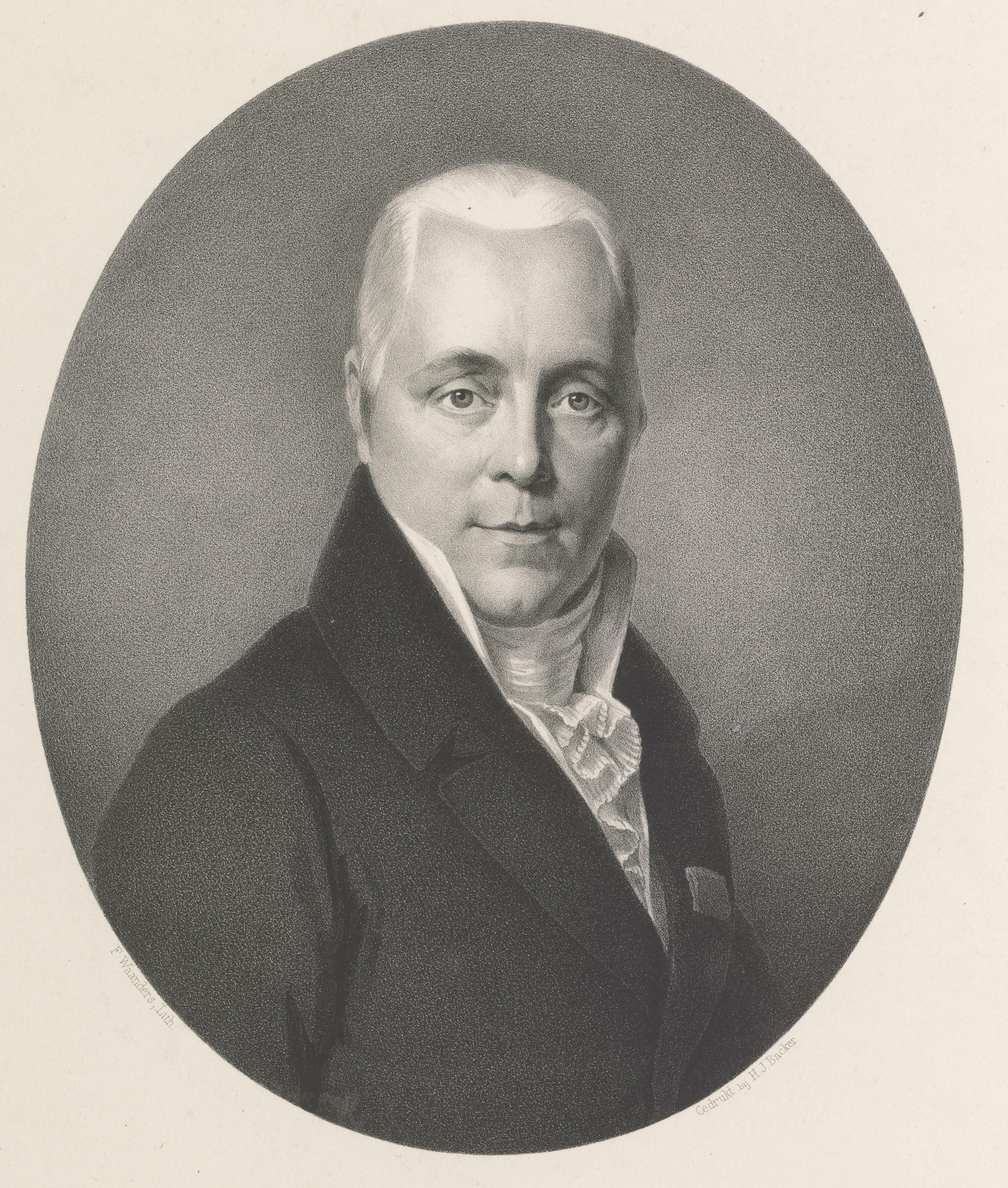 Henricus van Roijen, politician